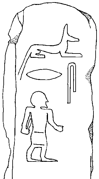 tomb stela of the dwarf Ser-Inpu from the first dynasty necropolis of king Udimu